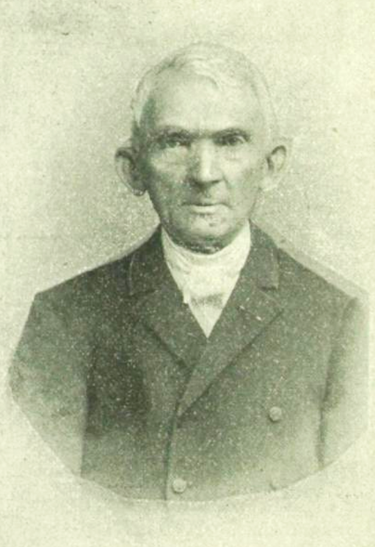 Hornjoserbsce: Michał Domaška (1820–1897); farar a serbski pěsnjer.